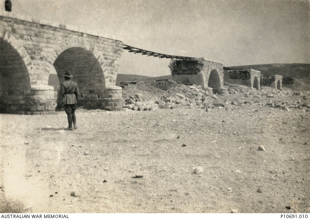 הגשר ההרוס בביר עסלוג'